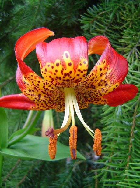 Lilium pardalinum